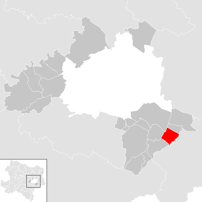 Bezirk Wien Umgebung